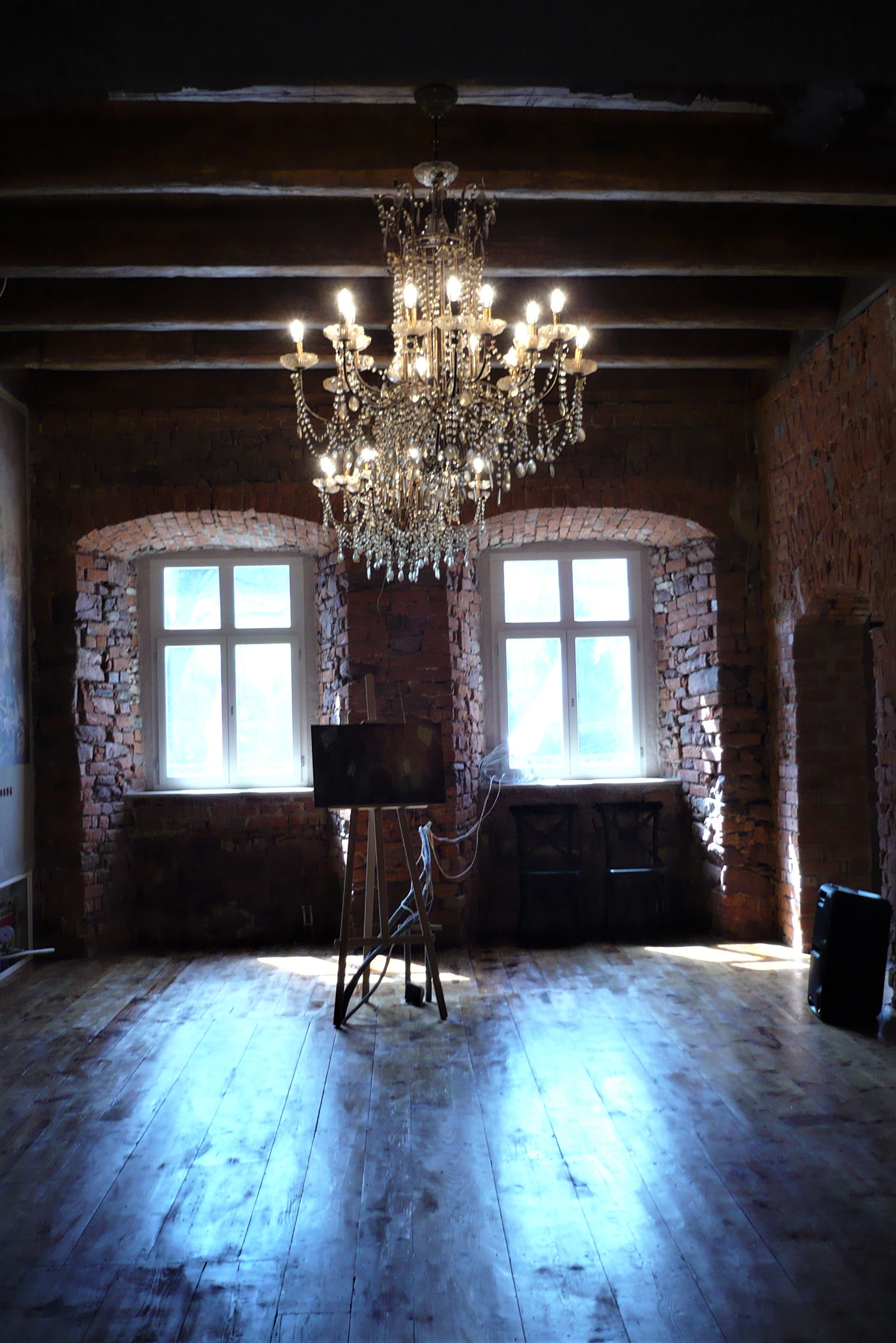 Ścinawka Górna. Sala w budynku bramnym